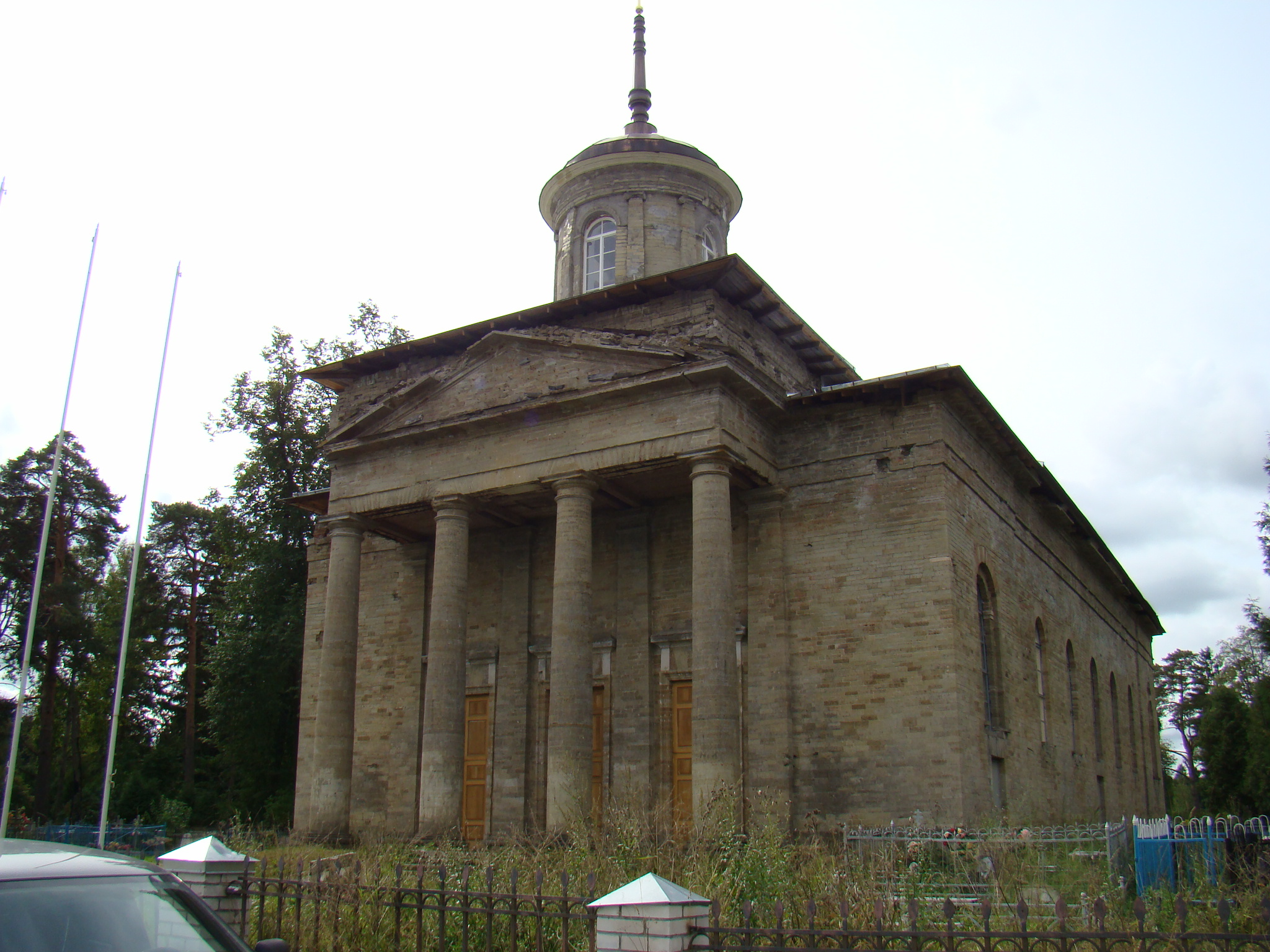 Кирха: Петрово, Гатчинский район, Ленинградская область